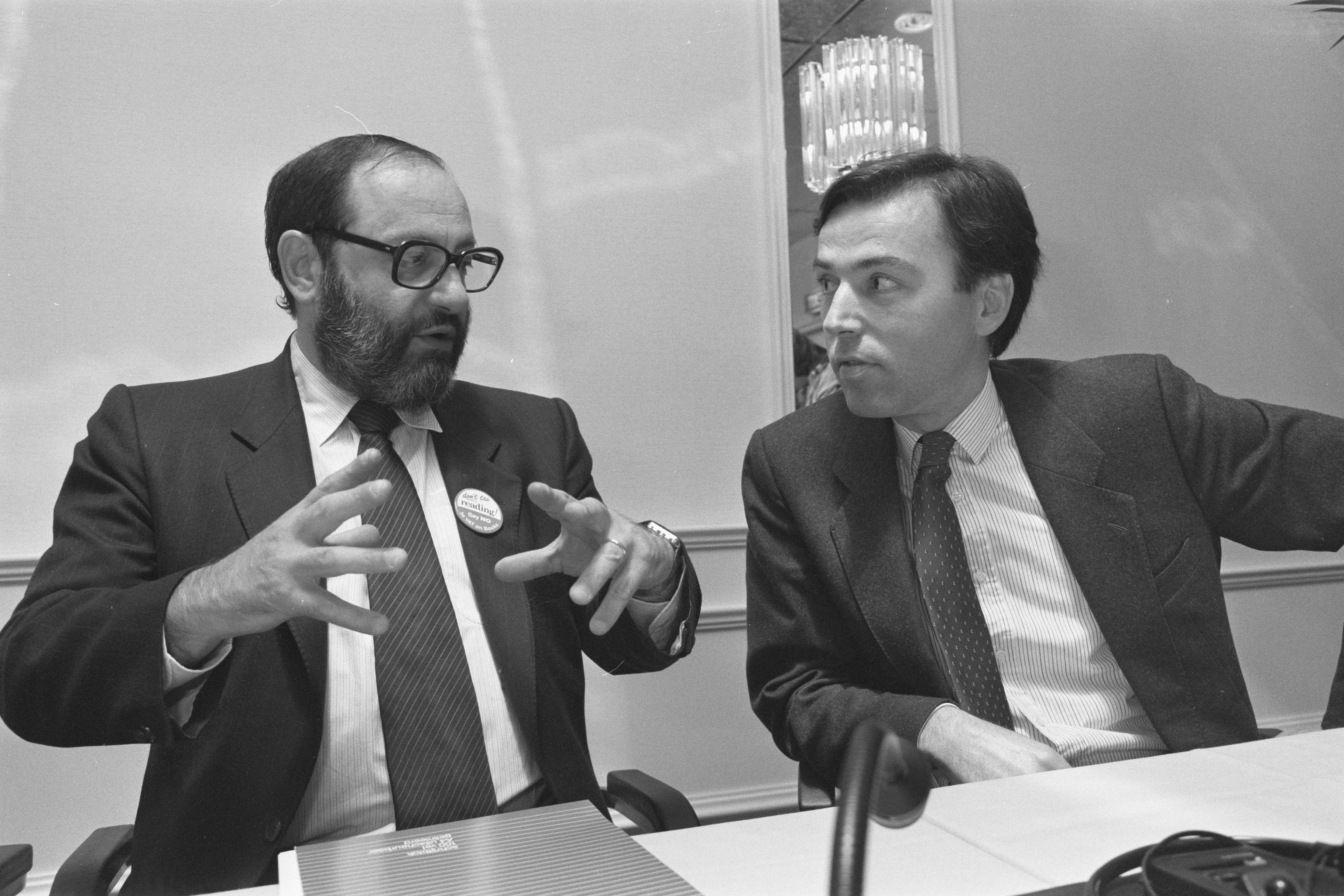 Collectie / Archief : Fotocollectie Anefo Reportage / Serie : [ onbekend ] Beschrijving : Boekenconferentie in Amsterdam; Umberto Eco (links) en minister Brinkman Datum : 27 oktober 1987 Locatie : Amsterdam, Noord-Holland Trefwoorden : conferenties Persoonsnaam : Brinkman, Elco, Eco, Umberto Fotograaf : Croes, Rob C. / Anefo Auteursrechthebbende : Nationaal Archief Materiaalsoort : Negatief (zwart/wit) Nummer archiefinventaris : bekijk toegang 2.24.01.05 Bestanddeelnummer : 934-1145